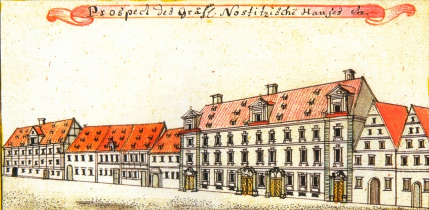 Palais Nostitz-Dyhrn in Breslau, Schlesien um etwa 1750.